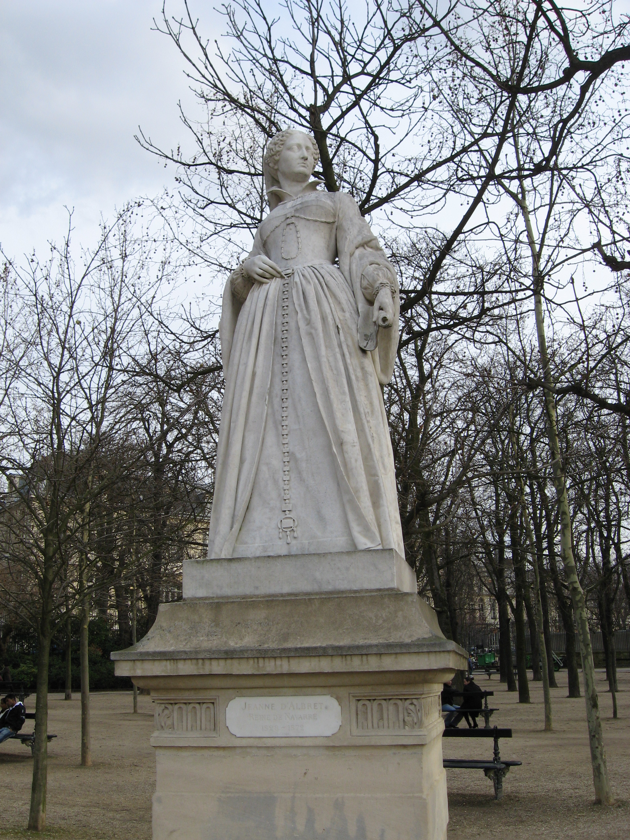 Jean-Louis Brian (français, 1805-1864): Jeanne d'Albret, Reine de Navarre (1528-1572), statue en pied, marbre (1848), Paris, Jardin du Luxembourg. Commande d'Etat. Voir Jeanne d'Albret (reine de Navarre).